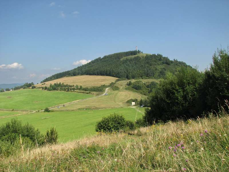 zastranie